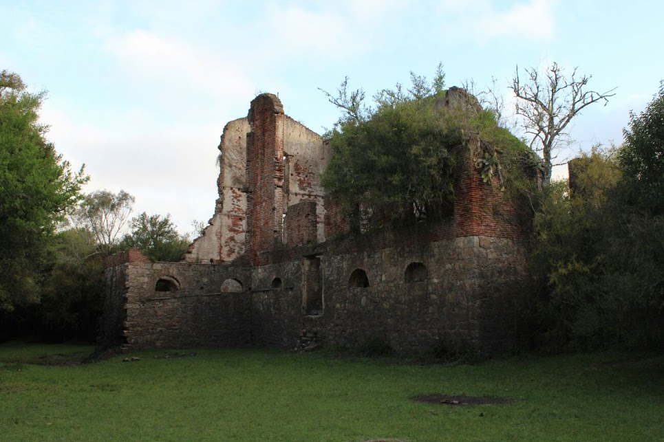 El Molino Quemado en el departamento de Colonia, Uruguay.